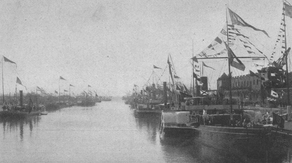 Der Rheinhafen in Karlsruhe im Jahr 1902.